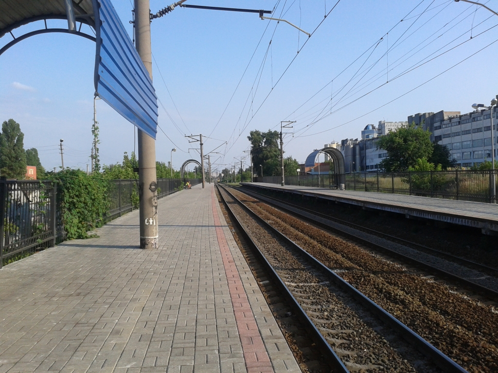 Залізнична платформа Лівобережна